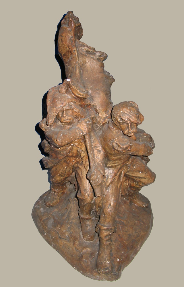 Deux soldats de 1792 portent le drapeau français